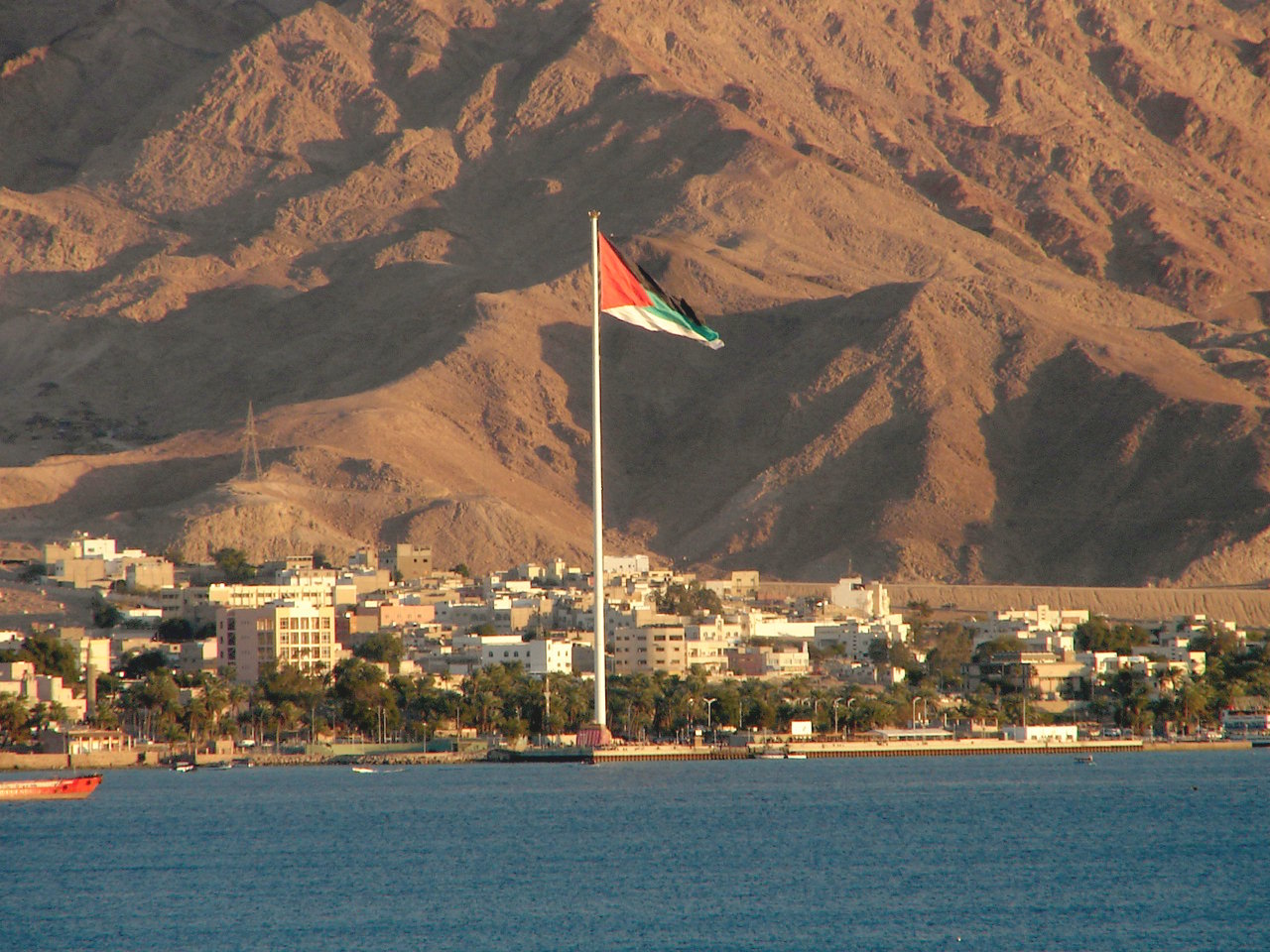 Aqaba as seen from Eilat